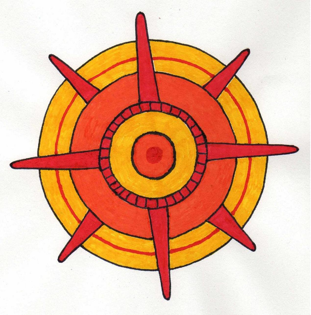 Redibujado en base a códices prehispánicos la imagen representa al Sol